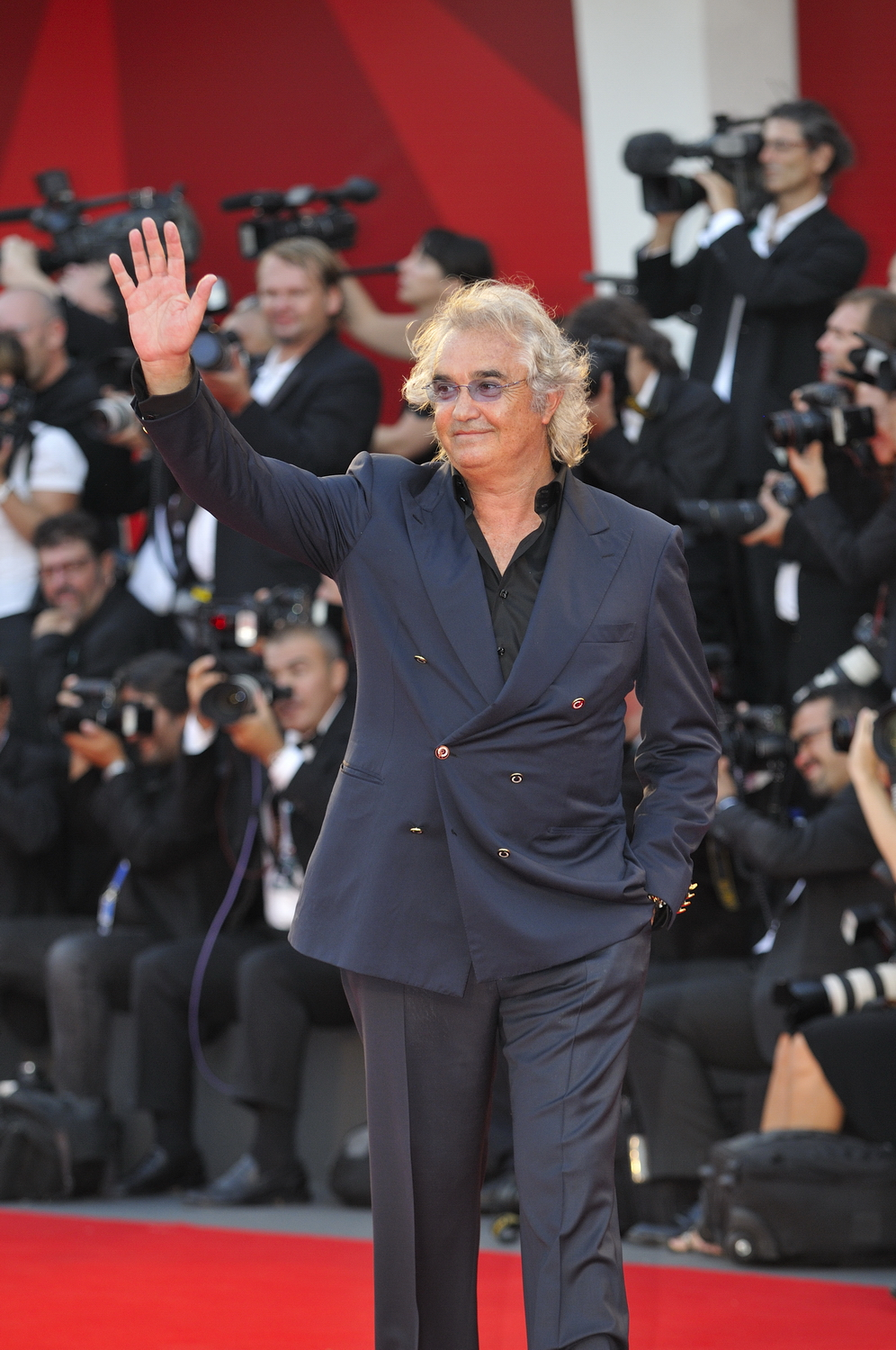 66ème Festival du Cinéma de Venise (Mostra) Flavio Briatore Soirée d'ouverture, tapis rouge, avec les premières célébrités arrivées à Venise.